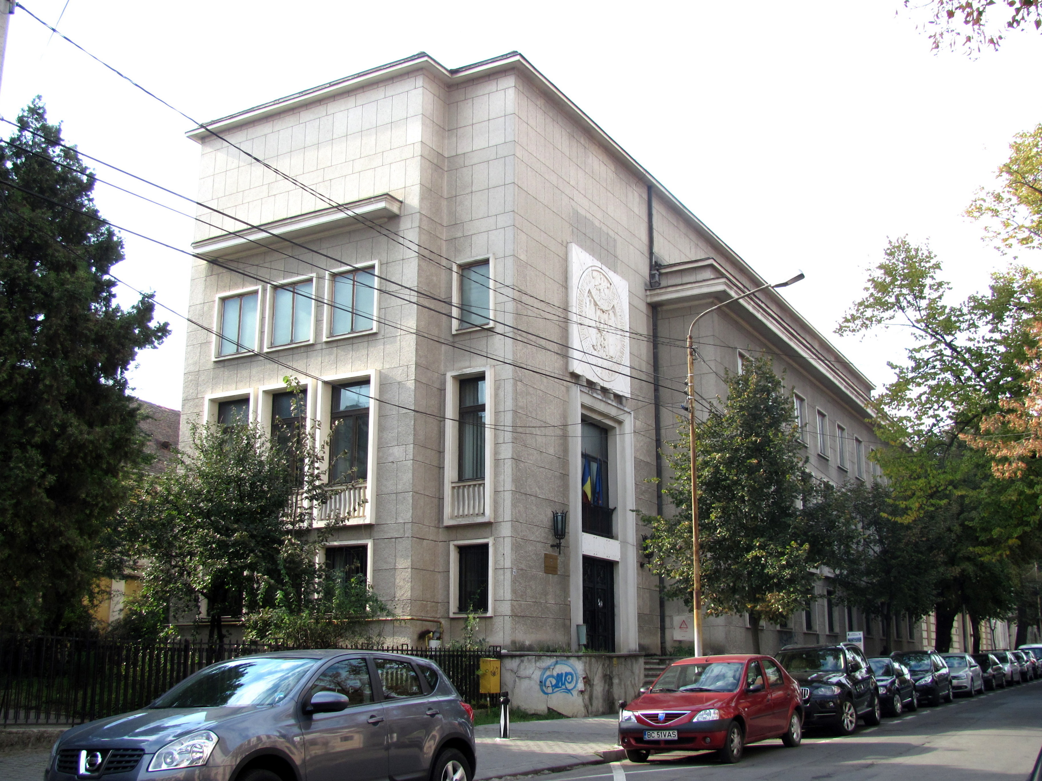 Cluj-Napoca - Str. M.KogălniceanuI. Nr.10 - Direcţia Judeţeană Cluj a Arhivelor Naţionale